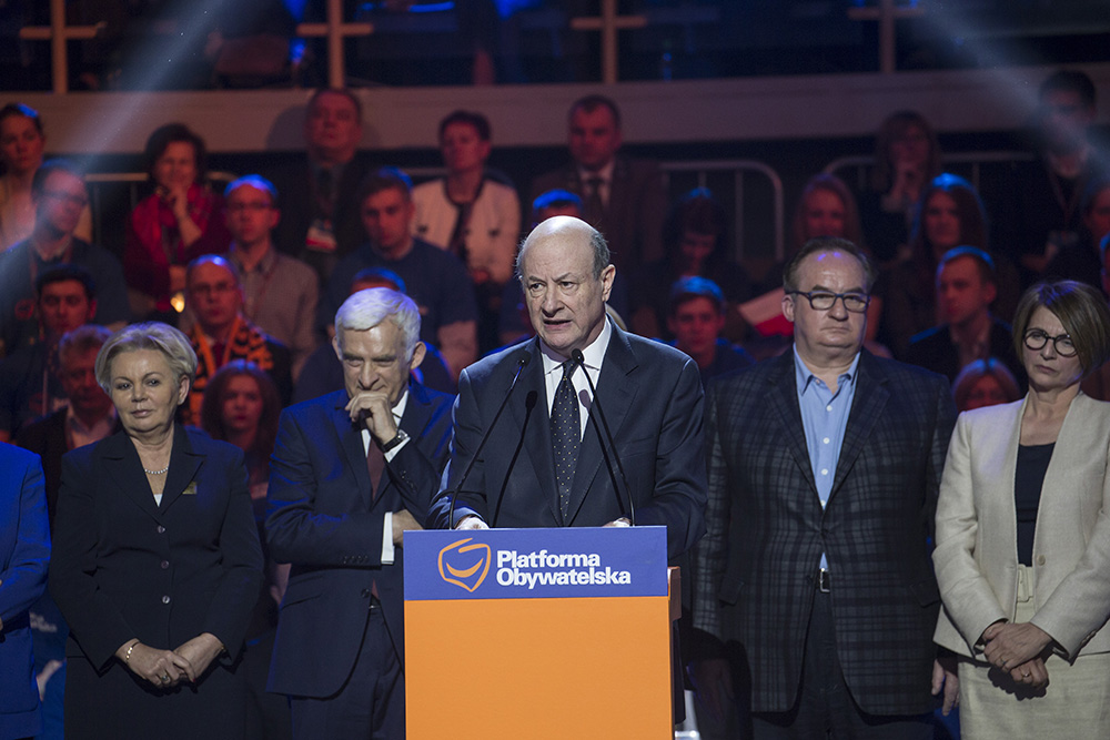 Konwencja wyborcza, Sopot 12.04.2014